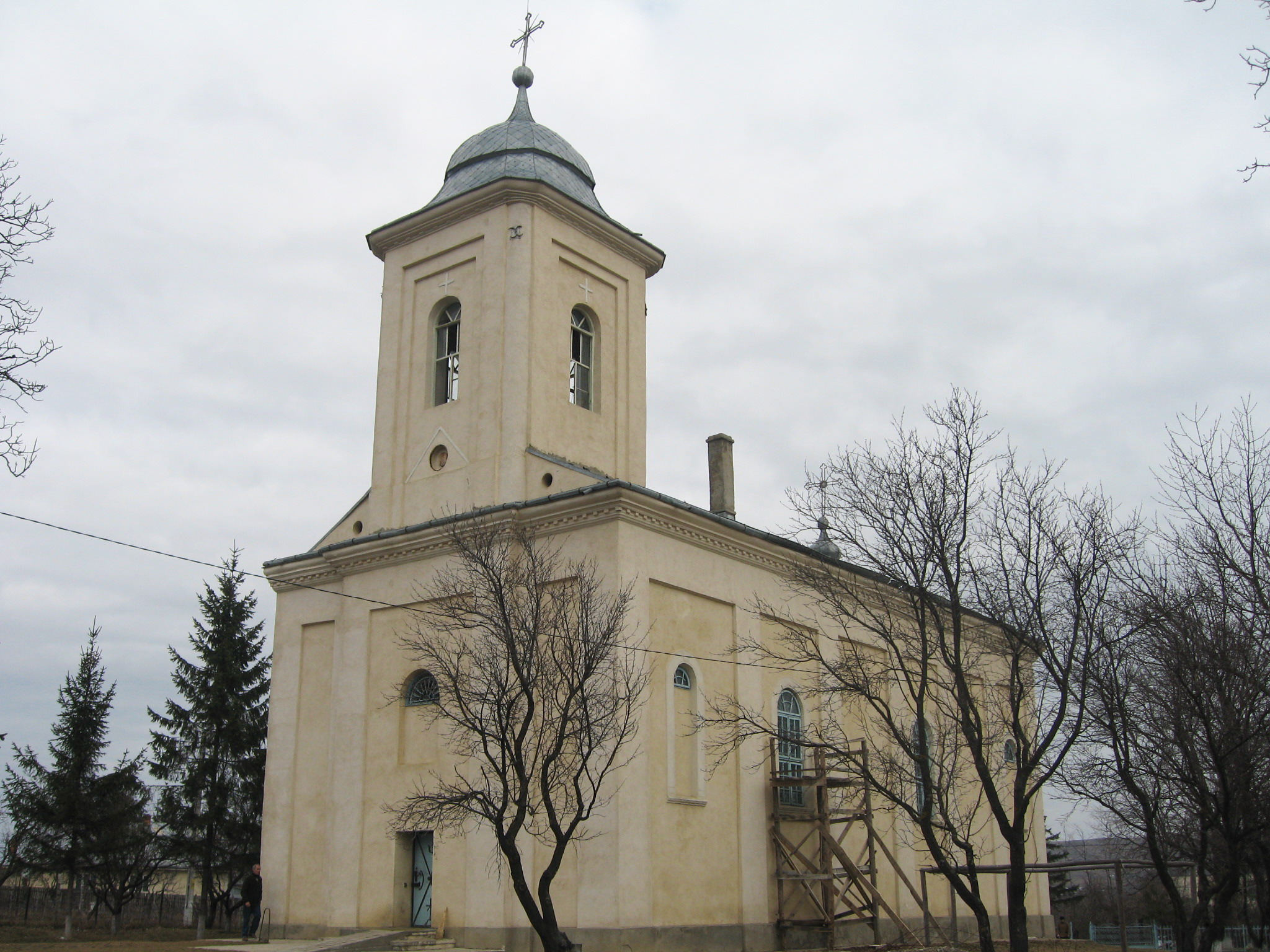 Biserica Duminica Tuturor Sfinților din Țibănești, jud. Iași, România